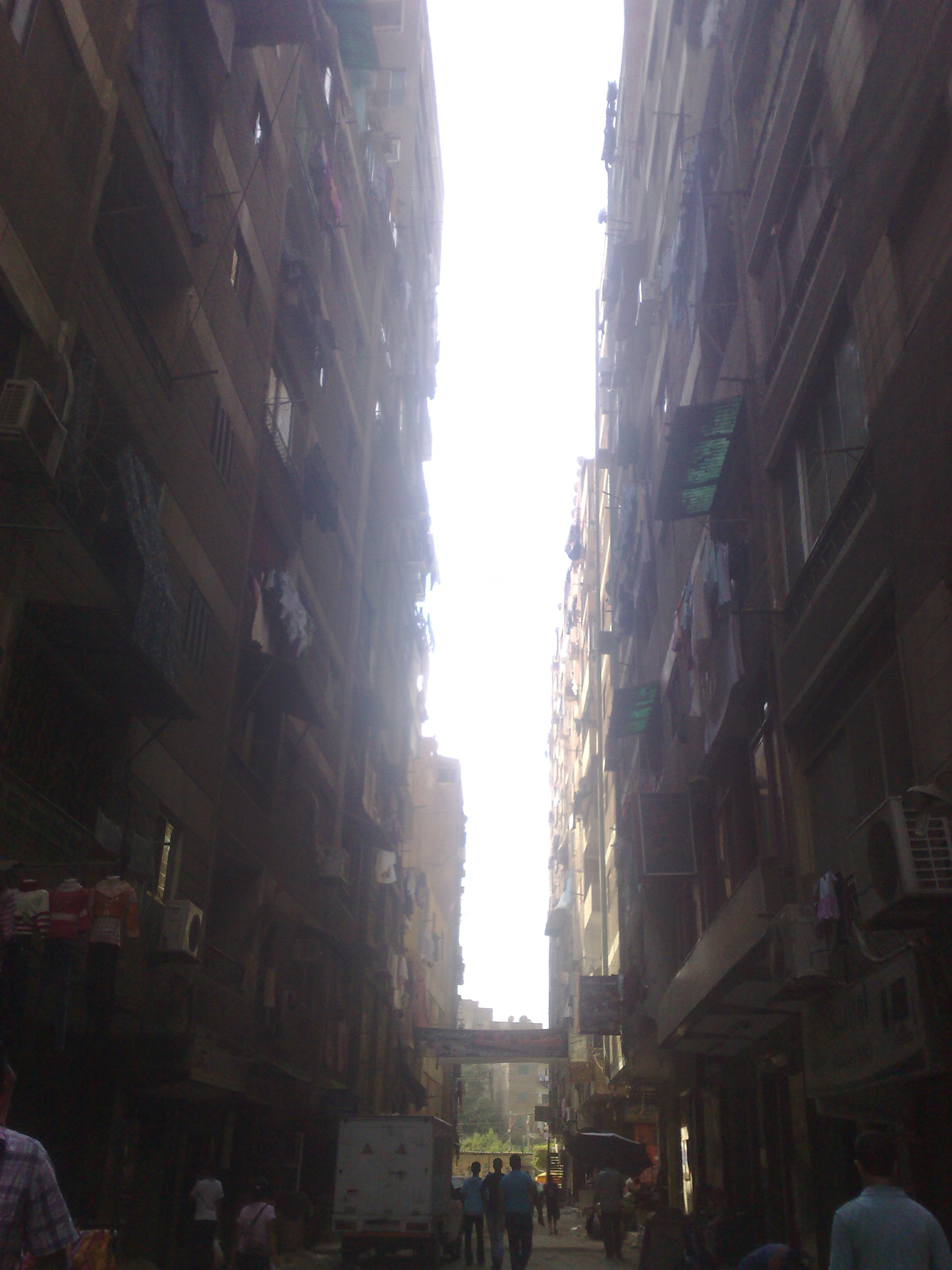 إحدى شوارع حدائق المعادي جنوب القاهرة